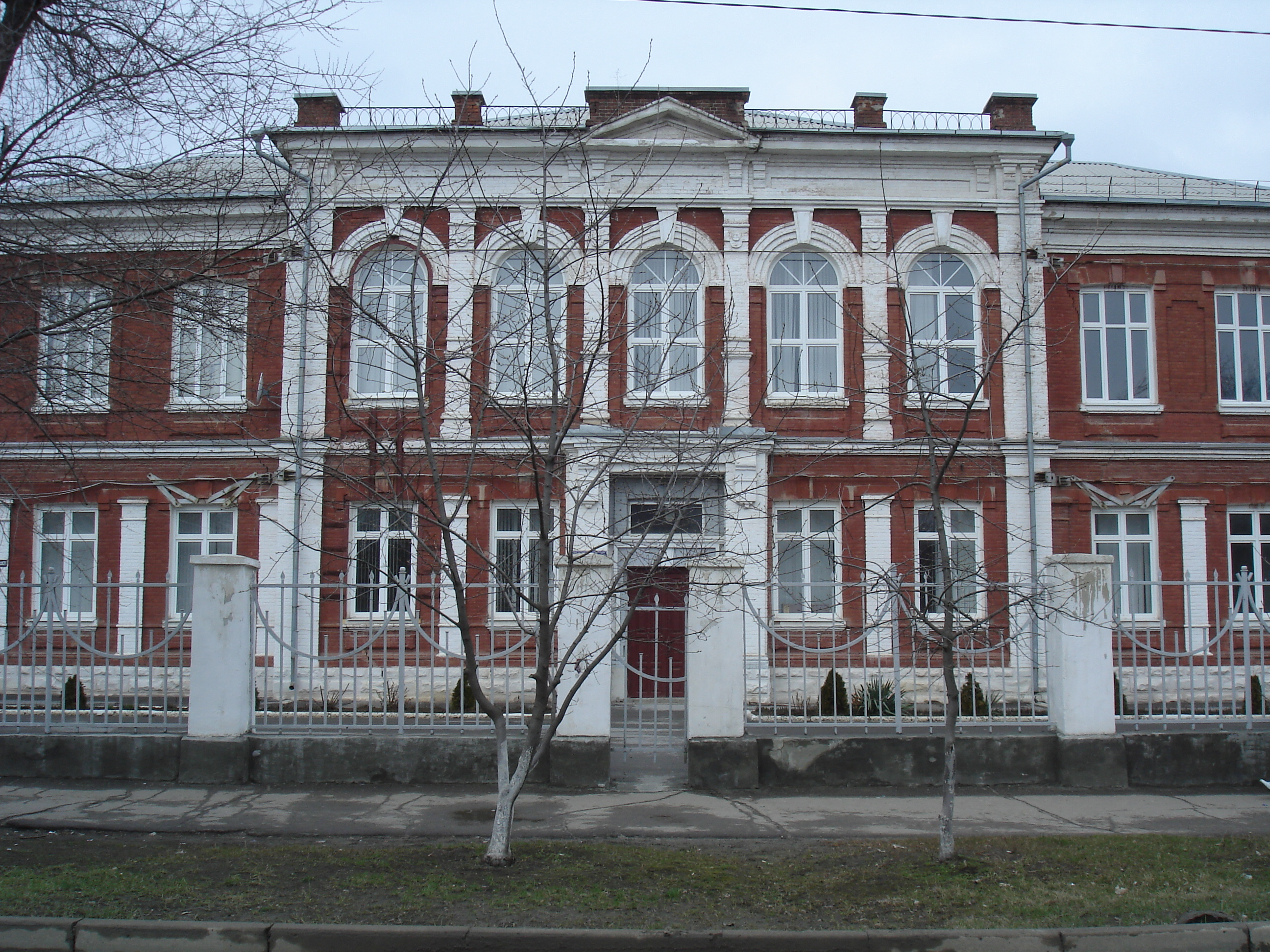 Каменск-Шахтинский, Ростовская область. Гимназия № 12 (фасад).